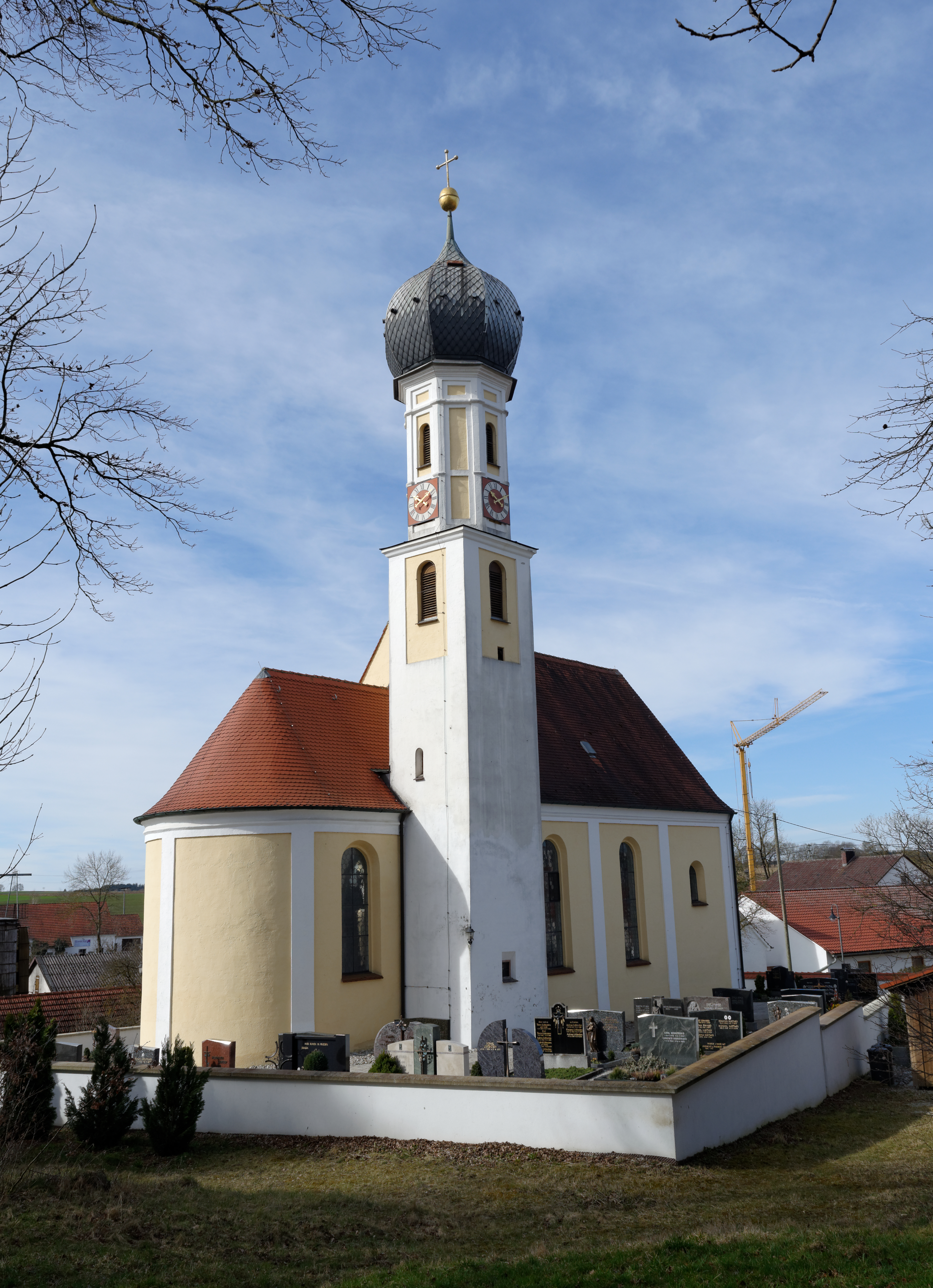 Pfarrkirche Mariä Verkündigung in Taiting bei Dasing. Ansicht von NO; Bayerische Denkmalliste Nr. D-7-71-122-23